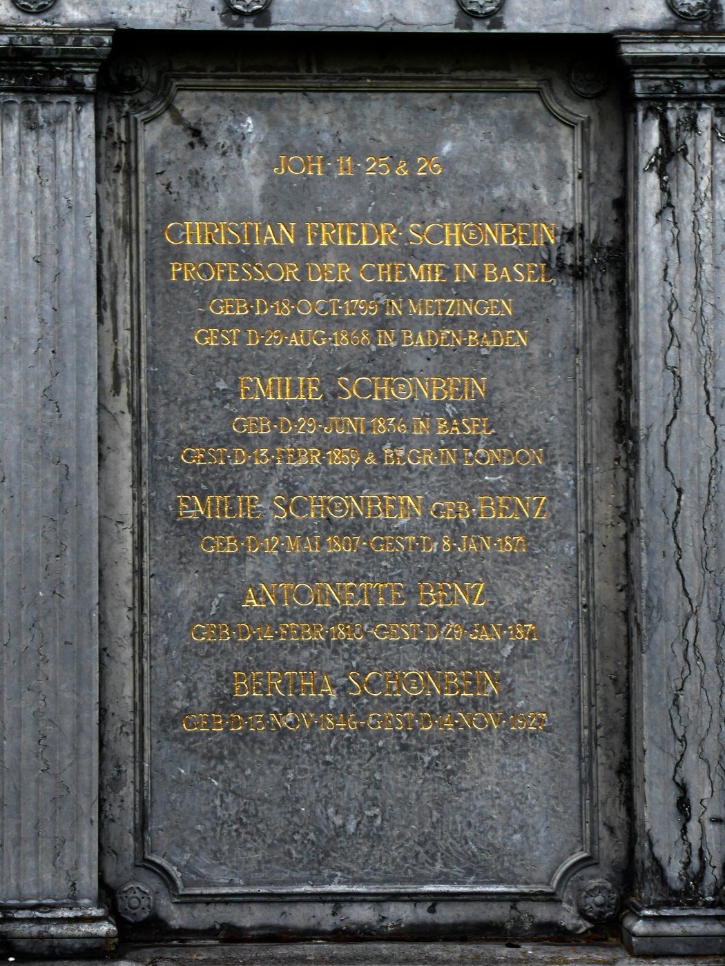 Christian Friedrich Schönbein-Benz (1799–1868) Profressor für Chemie und Physik, Entecker der Brennstoffzelle und des Ozon Erfinder der Schiessbaumwolle (Nitrozellulose). Grab auf dem Friedhof Wolfgottesacker, Basel